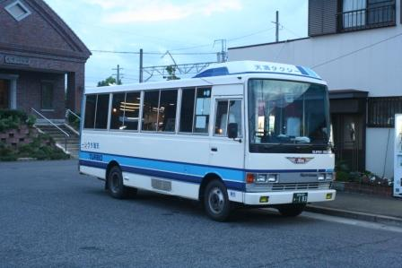 相乗りタクシー（小城市）の車両